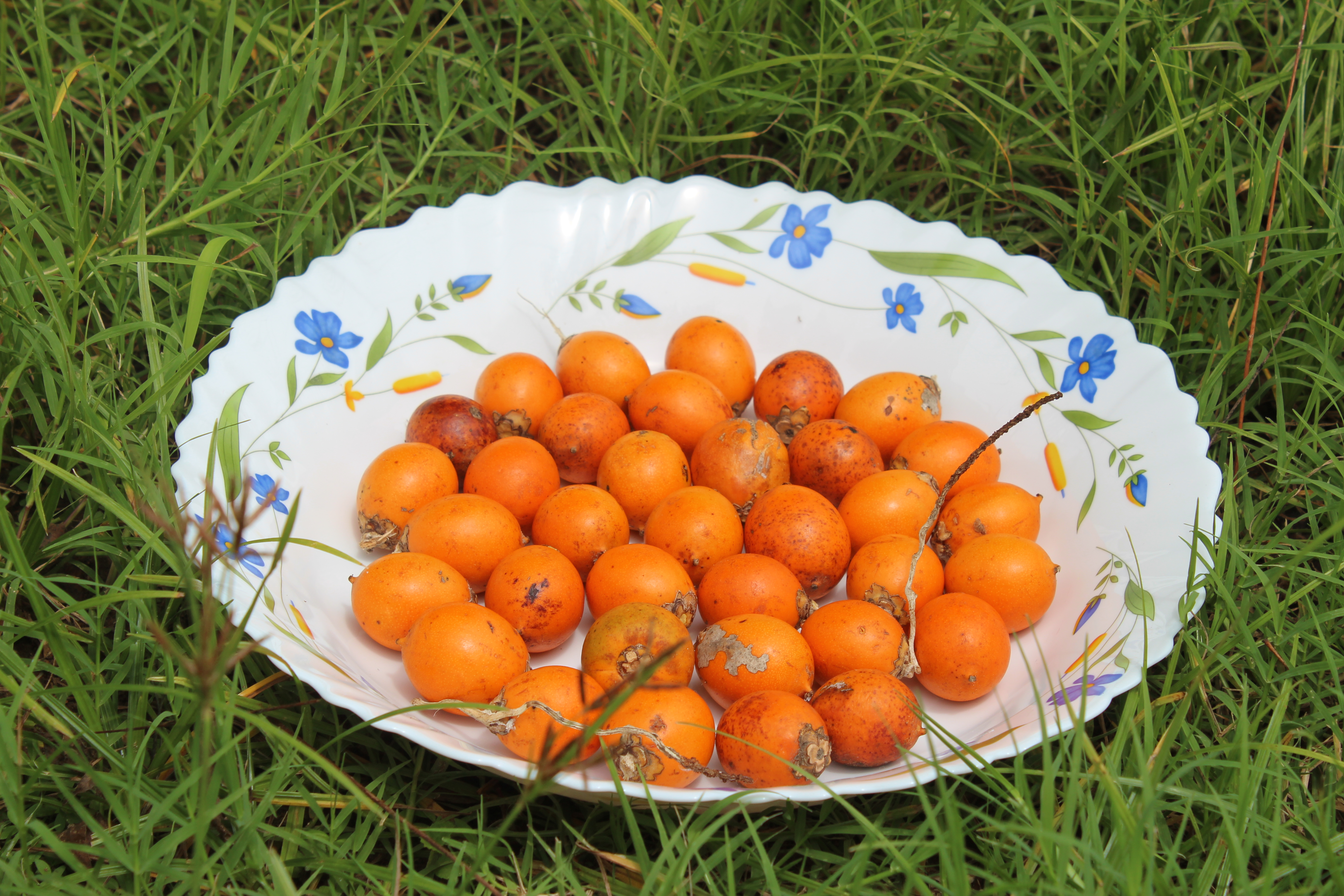 Bactris setosa (Tucum) já madura em Capitão de Campos, no Piauí.